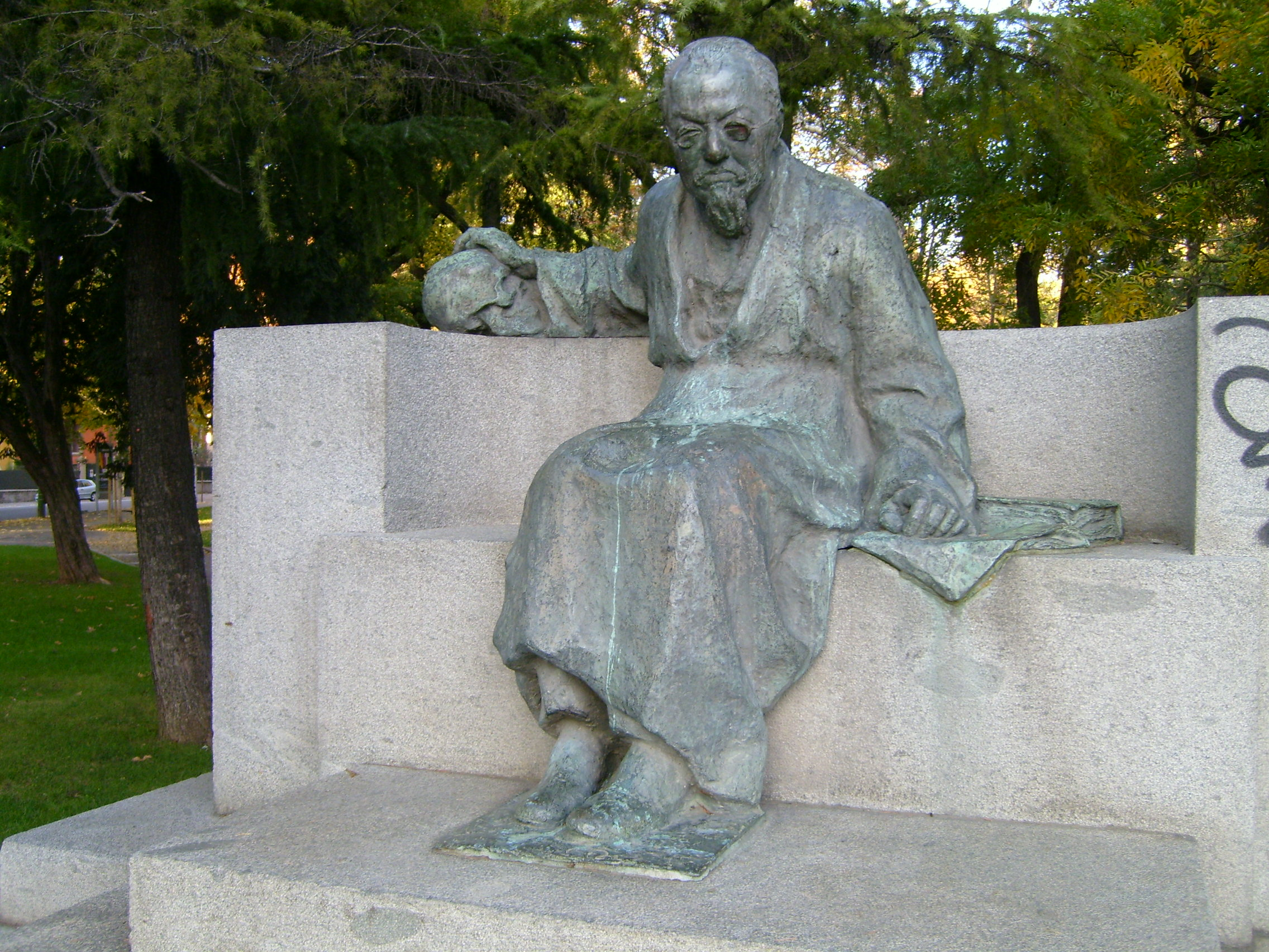 Monument to Cesare Lombroso, Giardini Cesare Lombroso, Verona, Italy